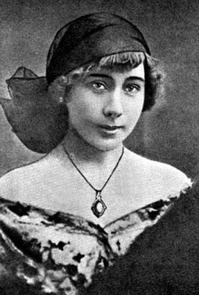 Софья Гославская в роли Ирэн ("Ирэн" Щепкиной-Куперник)